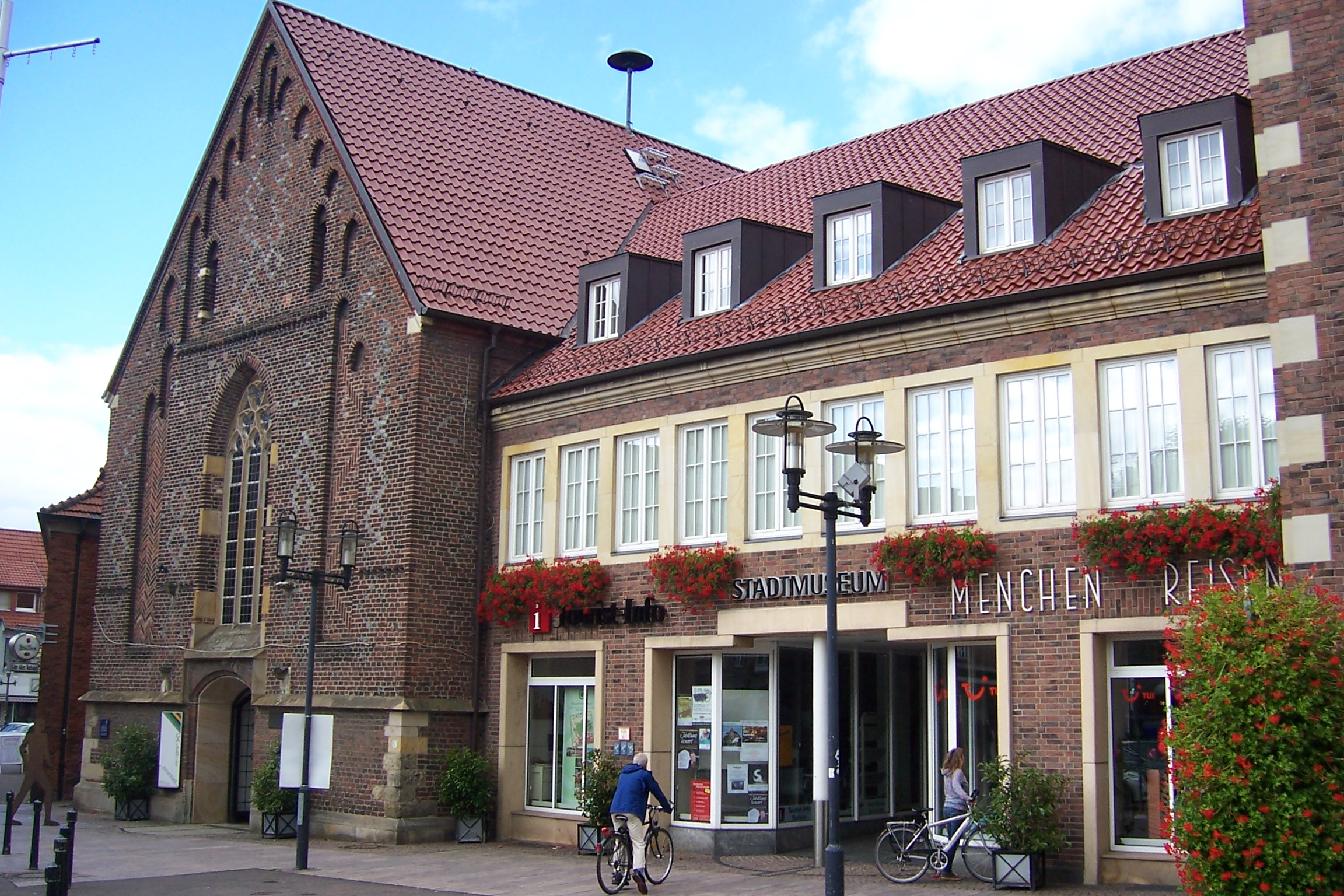 Heilig-Geist-Kirche Borken NRW Germany; seit 1809 profanisiert.